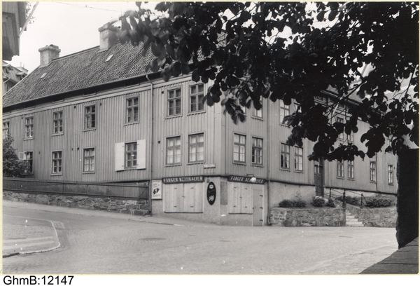 Olsonska gården, Allmänna Vägen 48, juli 1940, fotograf N. Wimarson, Bildsamlingen, Göteborgs stadsmuseum.